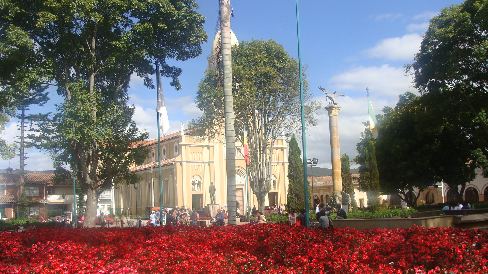 Ubicación: CAJICA, CUNDINAMARCA